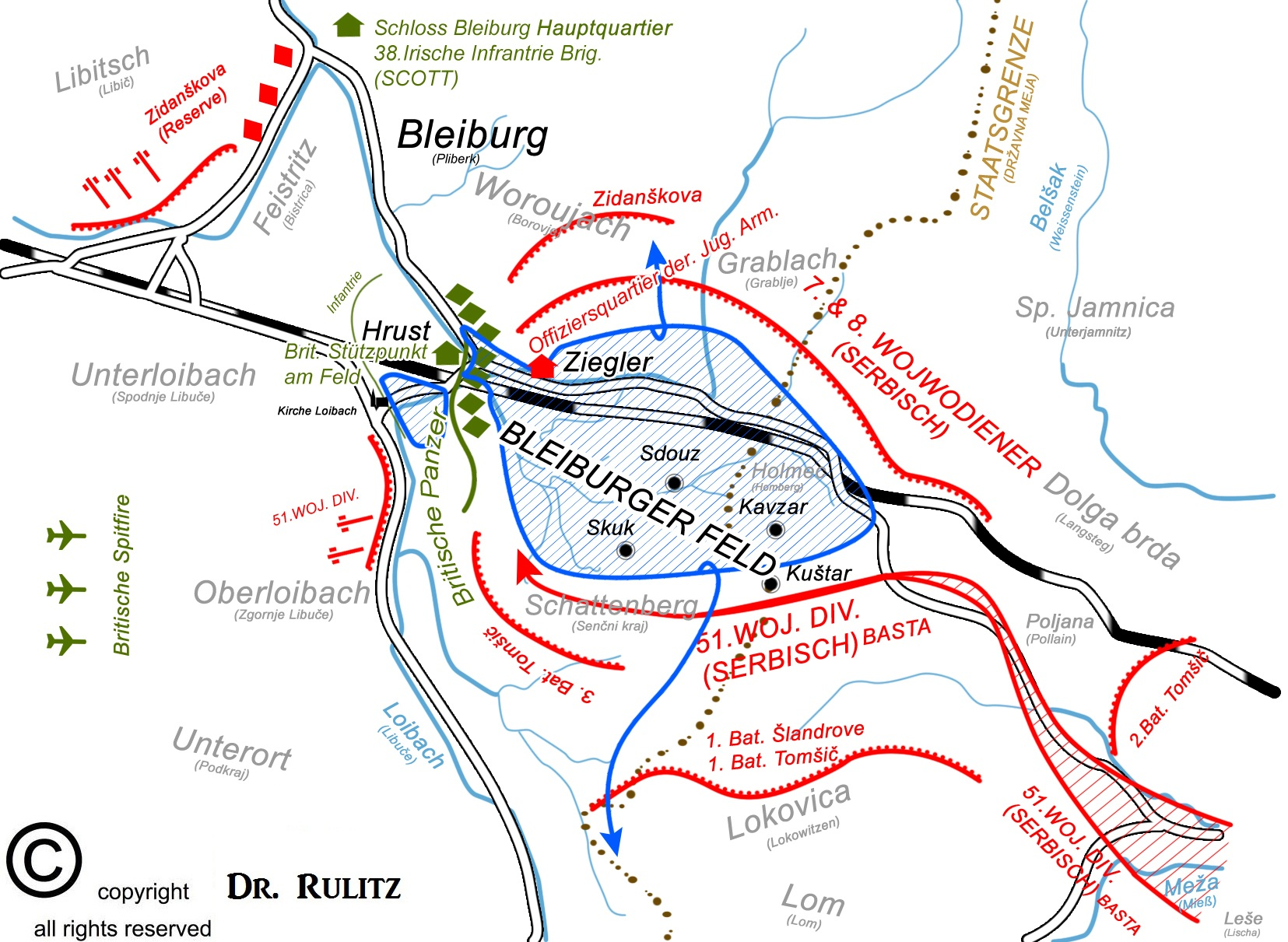 Schematische Darstellung (Dr. Rulitz) Das Massaker auf dem Bleiburger Feld durch die Staatsgrenze zwischen Österreich und Jugoslawien (Slowenien) getrennt. Die genaue Zahl der Getöteten Opfer der Massaker am Bleiburger Feld zu bestimmen gilt als sehr schwierig, weil erstens die Staatsgrenze zwischen Osterreich und Slowenien (damals Osterreich und Jugoslawien) mitten durch das Bleiburger Feld verläuft. Auf Österreichischer Seite wurden etliche Aufgefundene Tote auf die Militärfriedhöfe Völkermarkt und St. Veit an der Glan überbettet. Der Rest der Überreste der Leichen liegt nach wie vor in den Wiesen und Wäldern verstreut. Hinzu kommt, dass auf jugoslawischer Seite des Feldes etliche Fluchtlinge vor ihrer Ankunft am Feld in Gefechten mit Einheiten der jugoslawischen Armee gefallen waren. Bevor die Flüchtlinge das Bleiburger Feld erreichten, wurden etliche aus den Bergen von Partisanen niedergemetzelt.